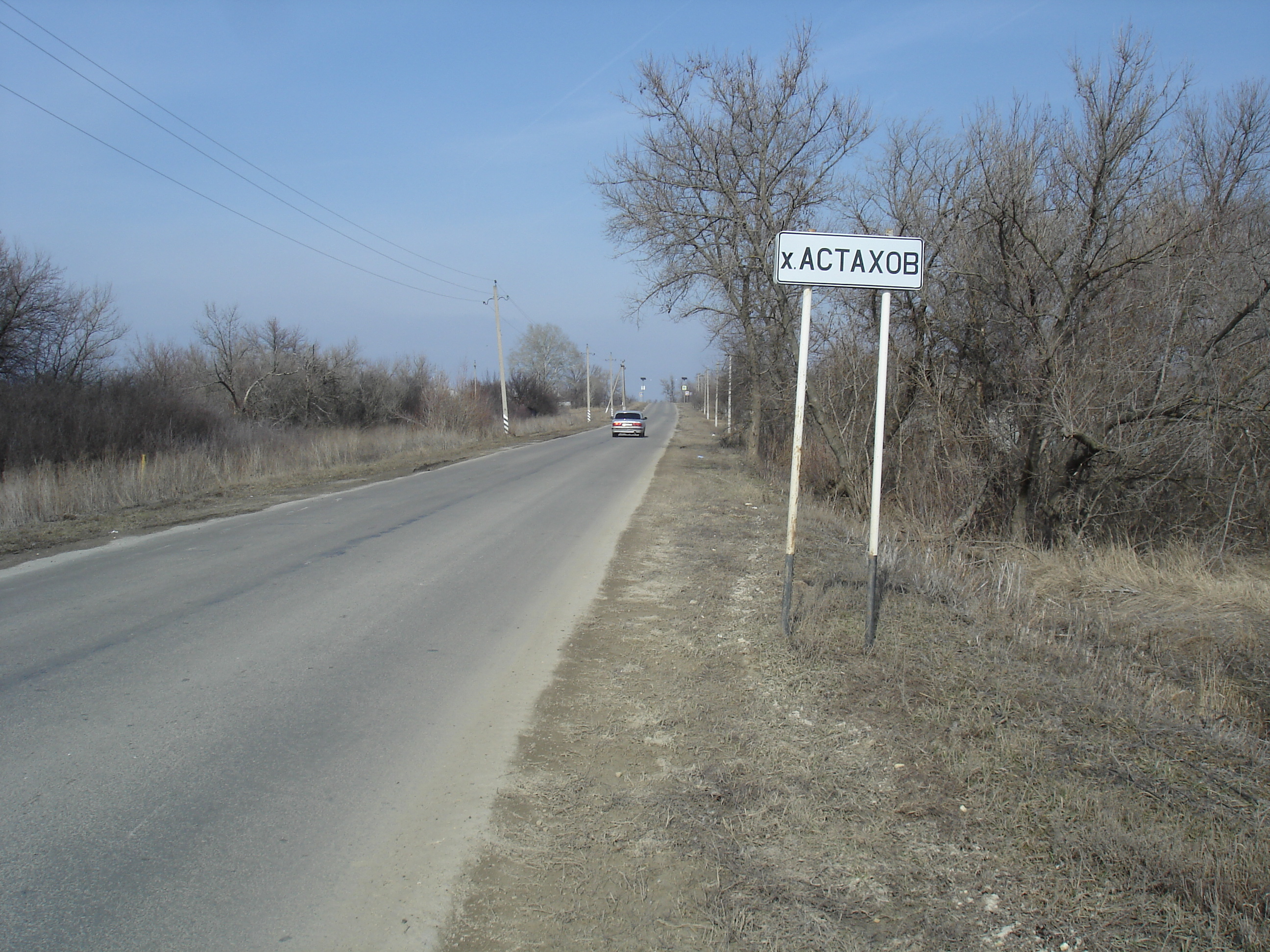 Дорожный знак хутора Астахов Ростовской области на дороге из Каменска-Шахтинского в посёлок Глубокий.